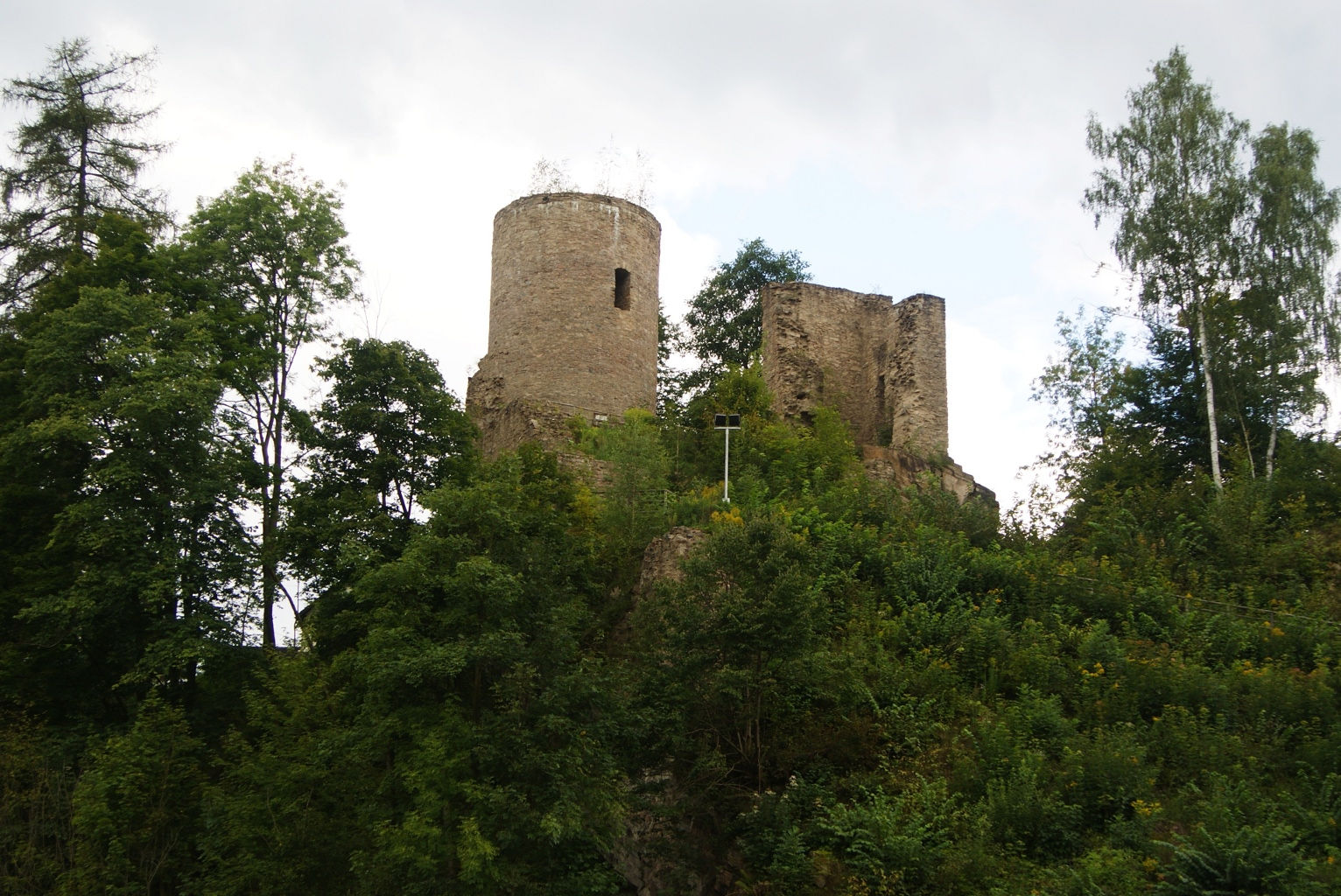 Burgruine Niederlauterstein